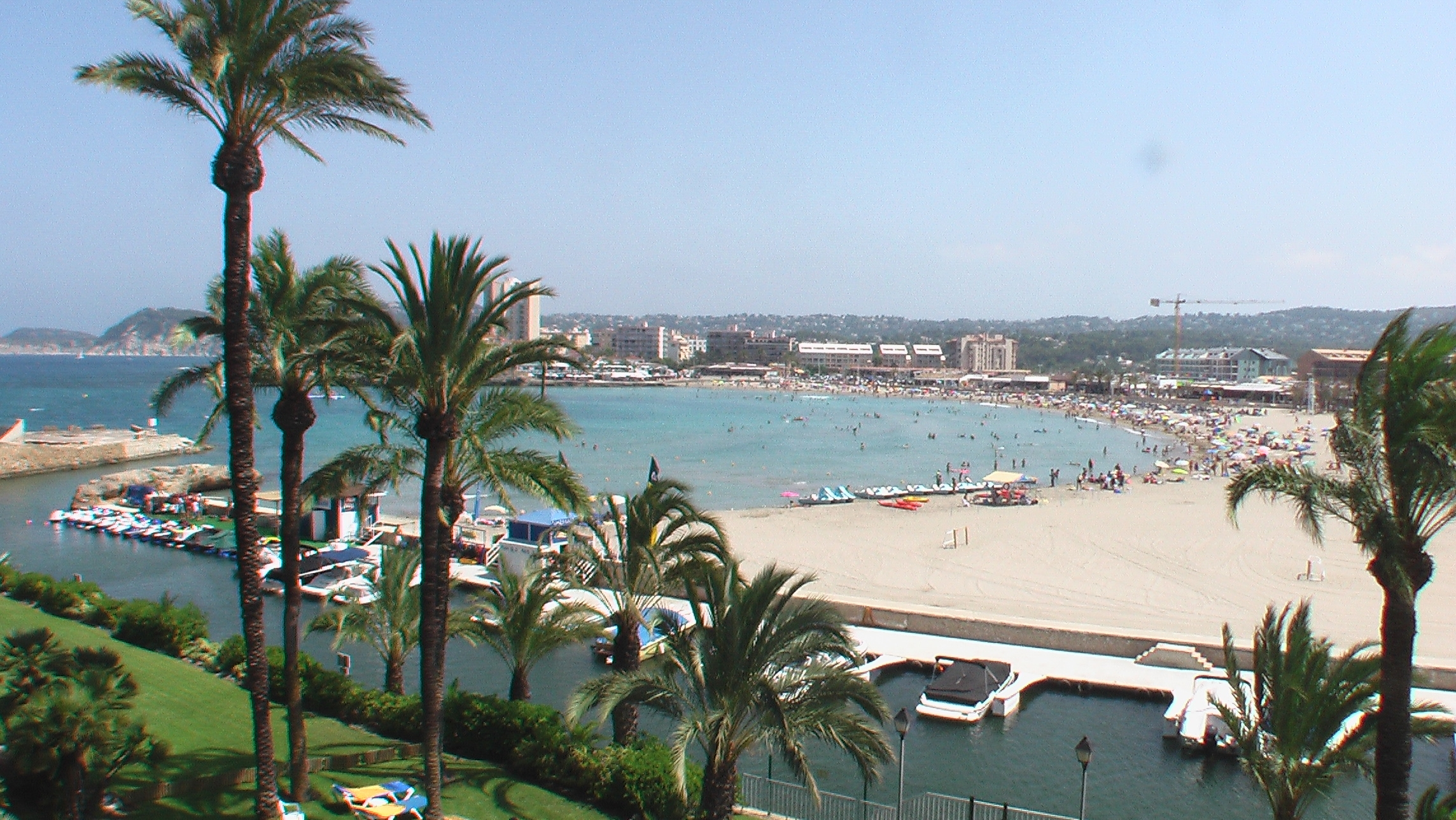 XàbiaBlickAufYachthafenUndStrand